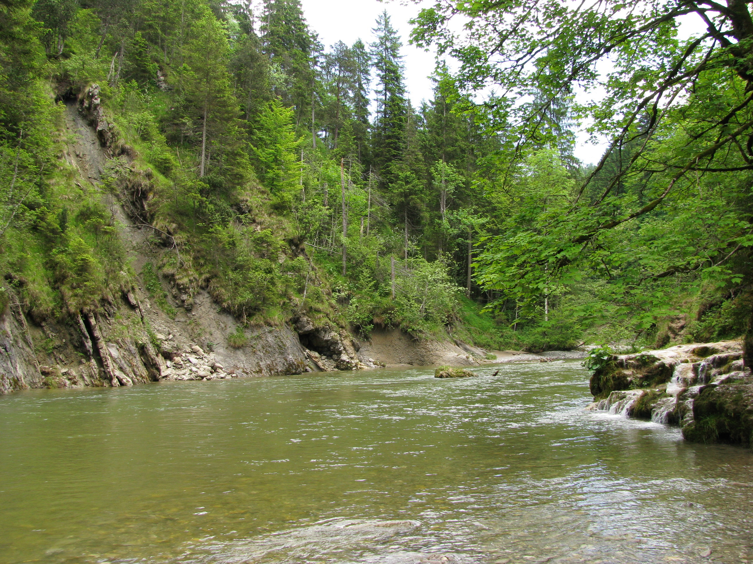 Die Ammer bei den Schleierfällen